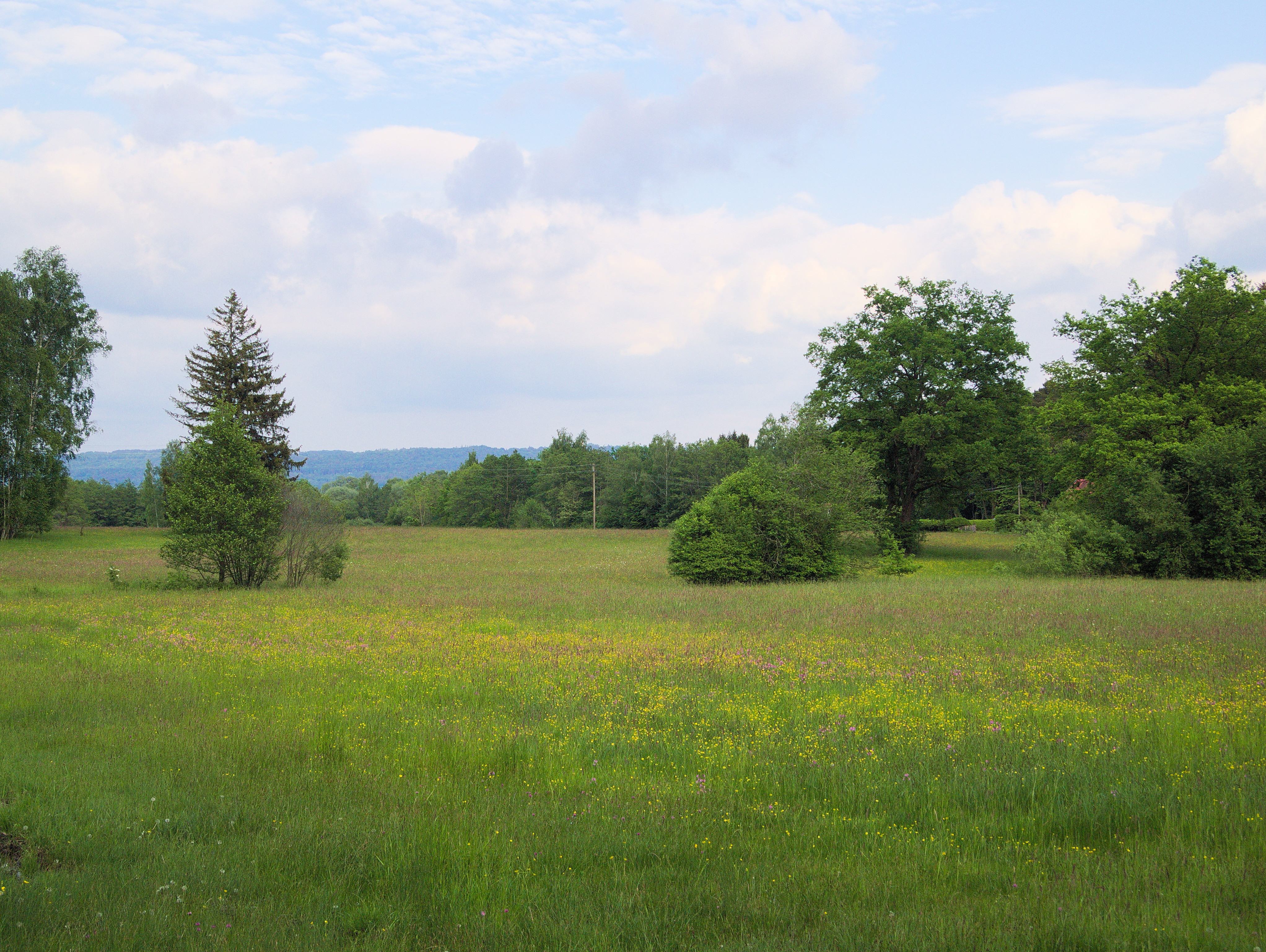 Seeholz und Seewiese, Ammersee, Bayern, NSG-00245.01